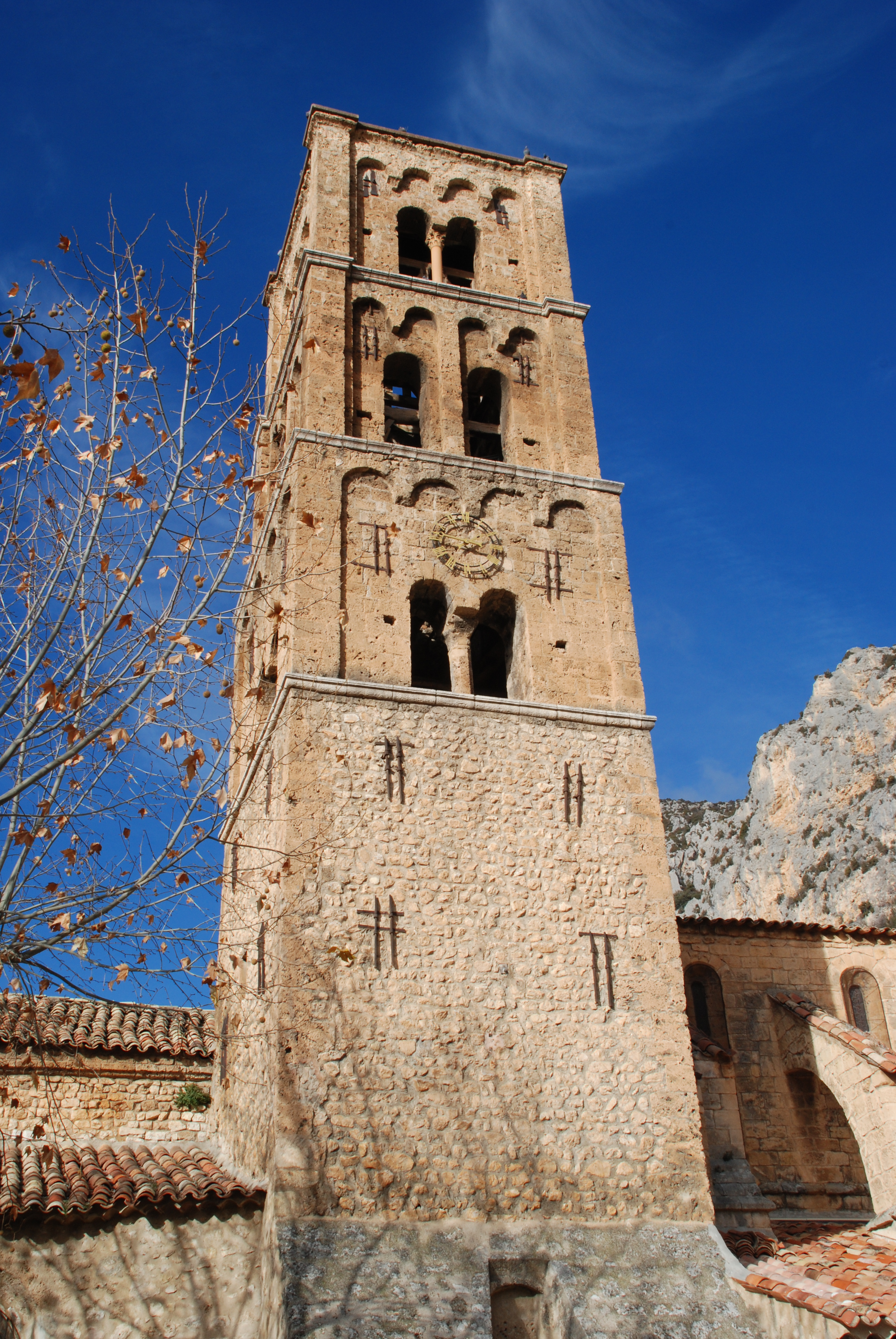 France - Provence - Moustiers-Sainte-Marie : Clocher